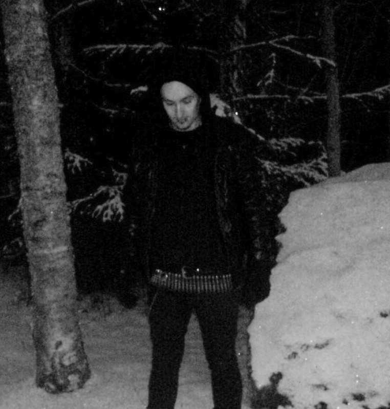 Tuomas Keskimäki